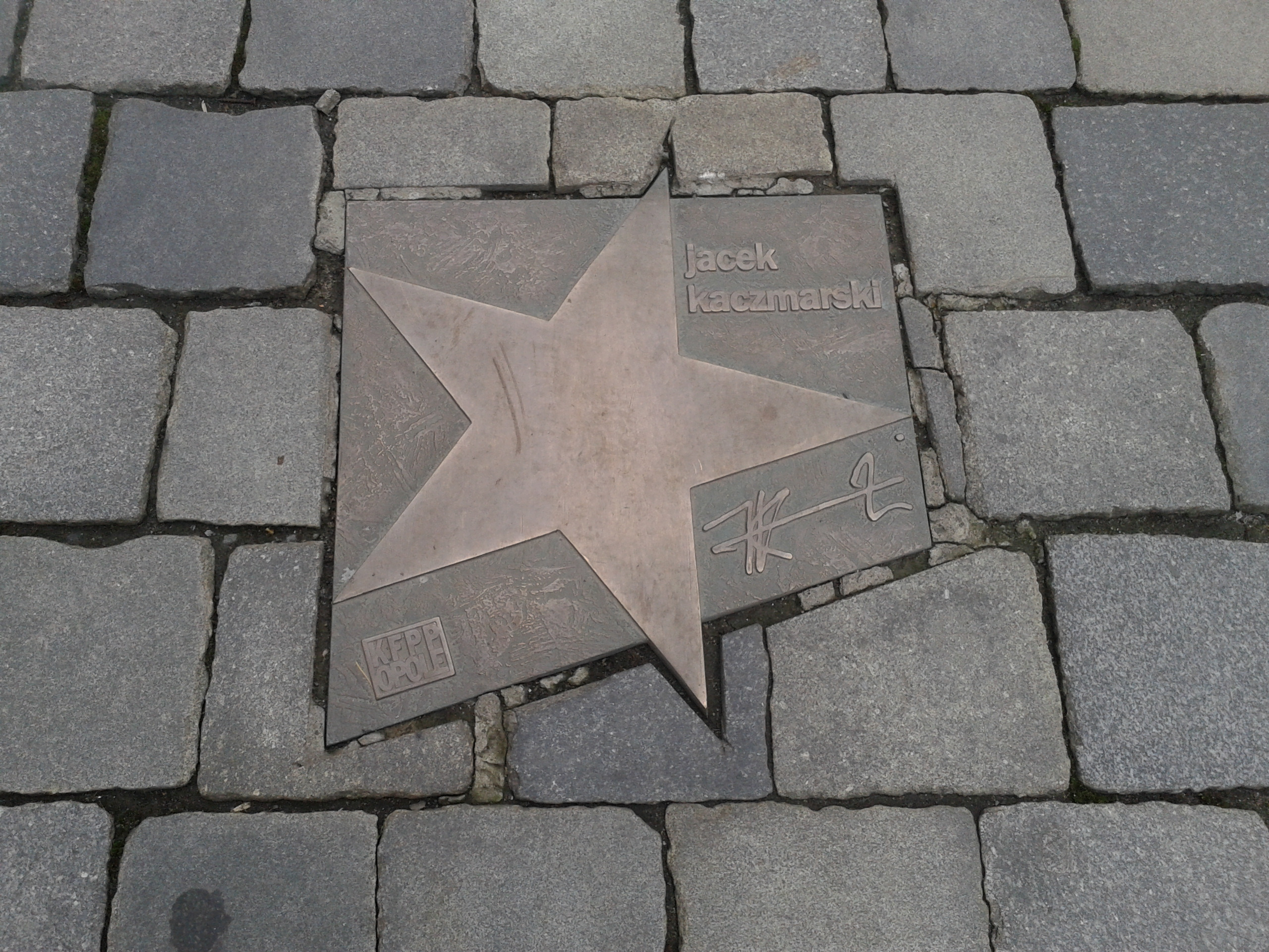 Gwiazda Kaczmarskiego w Alei Gwiazd Polskiej Piosenki w Opolu.